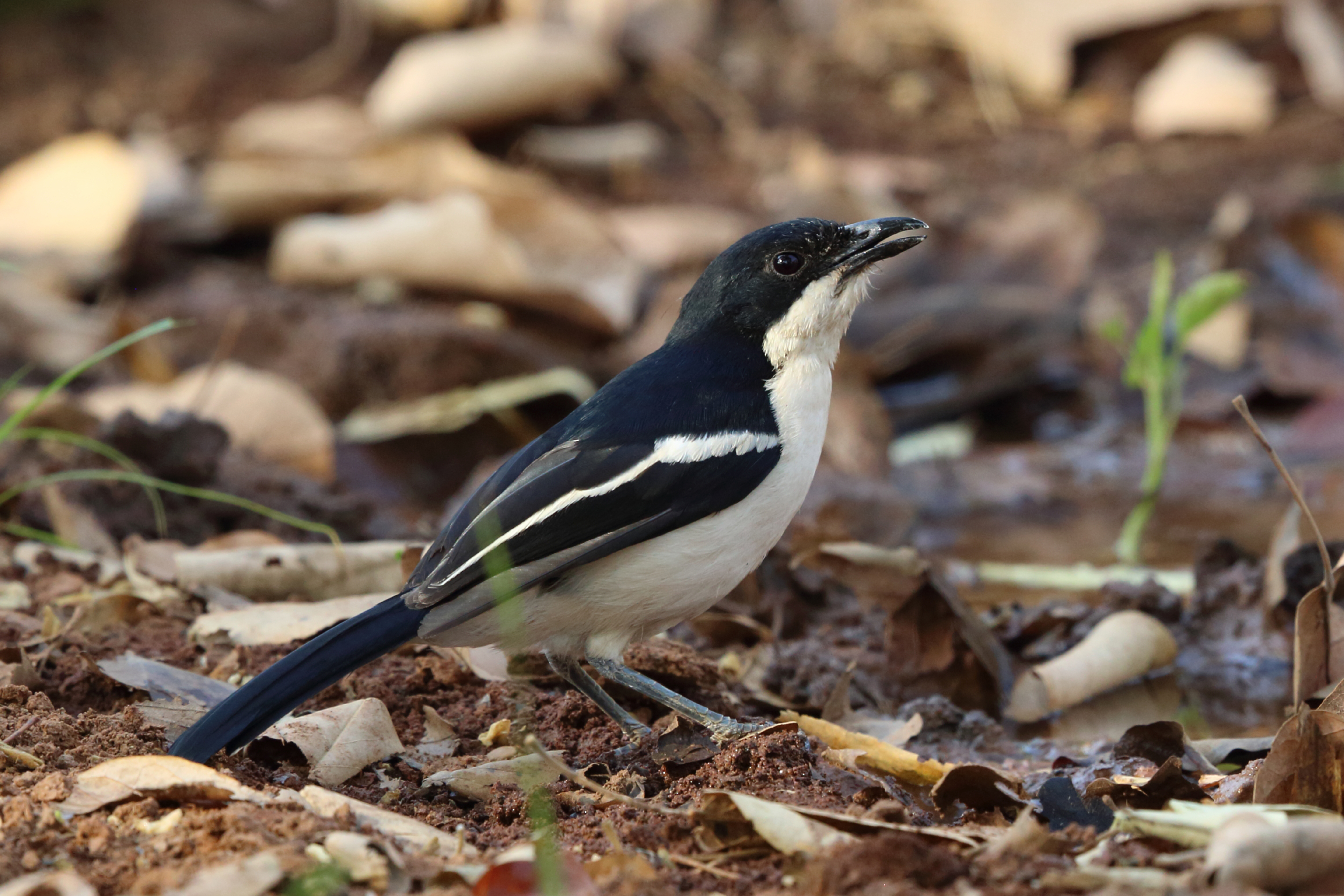 Tropical Boubou, Sakania, DRC